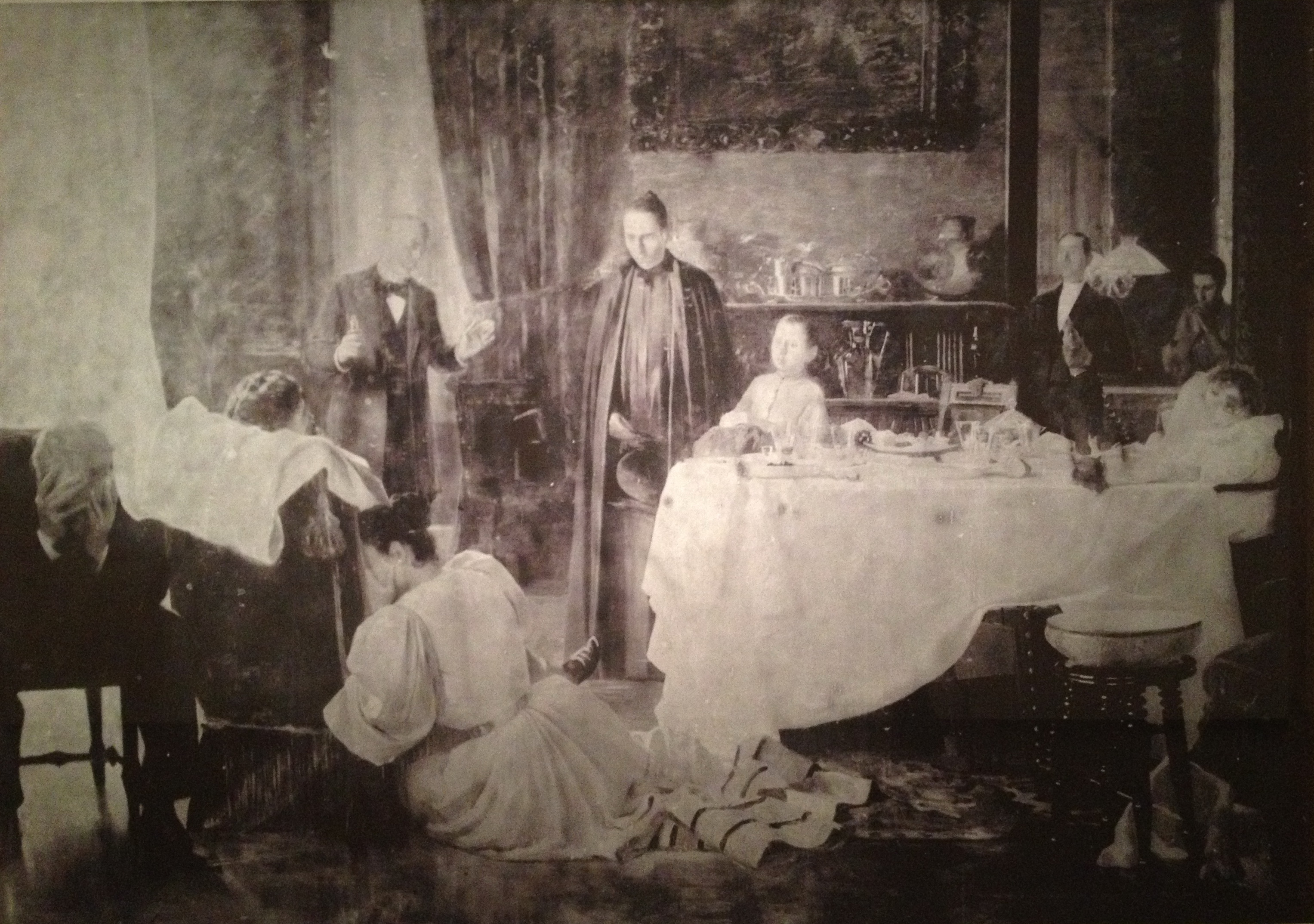 La Mort Sobtada. Obra perduda de Joan Llimona